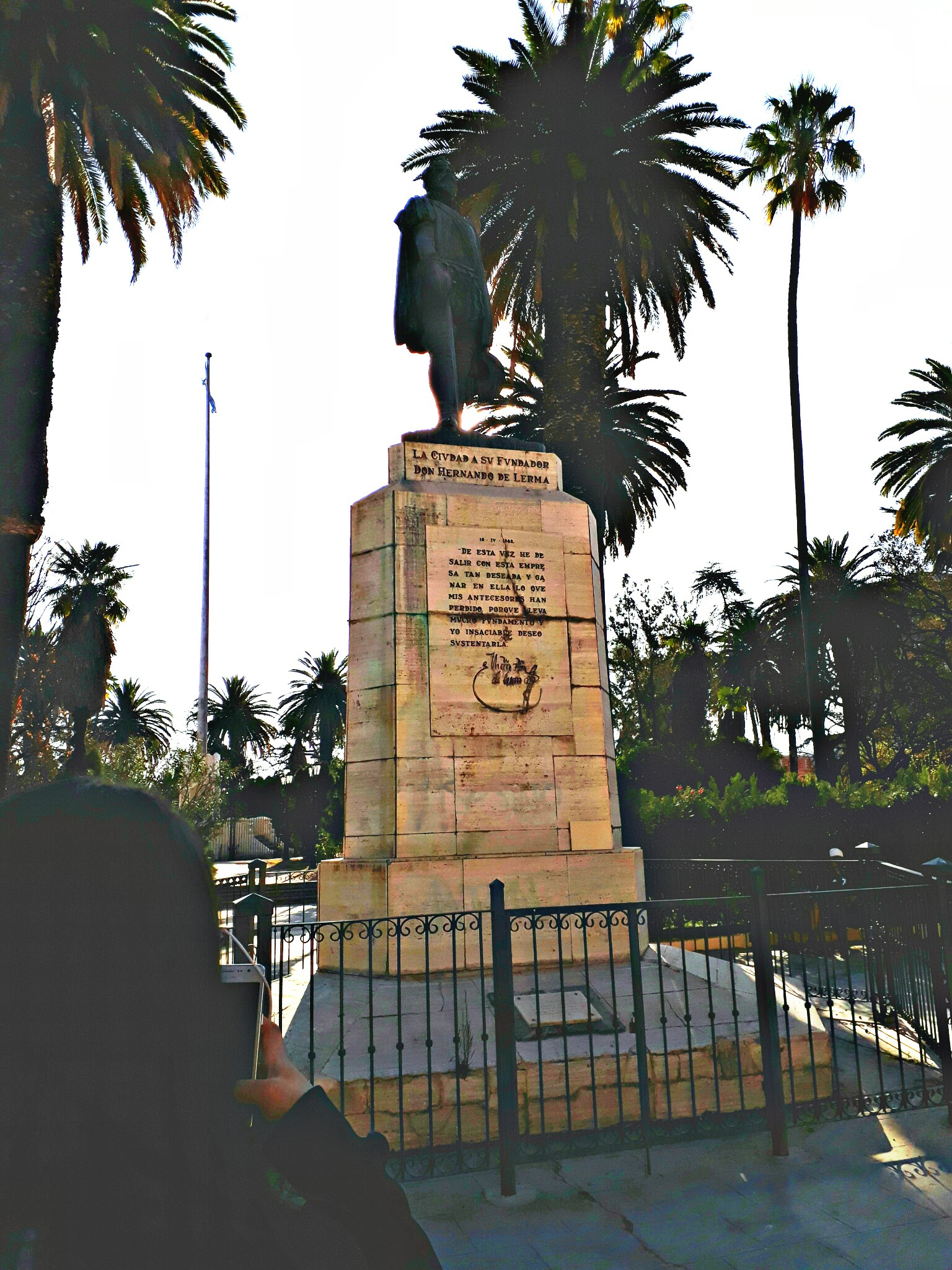 el monumento de don hernando de lerma ubicado en la plaza güemes frente al palacio legislativomonumento a don hernando de lerma